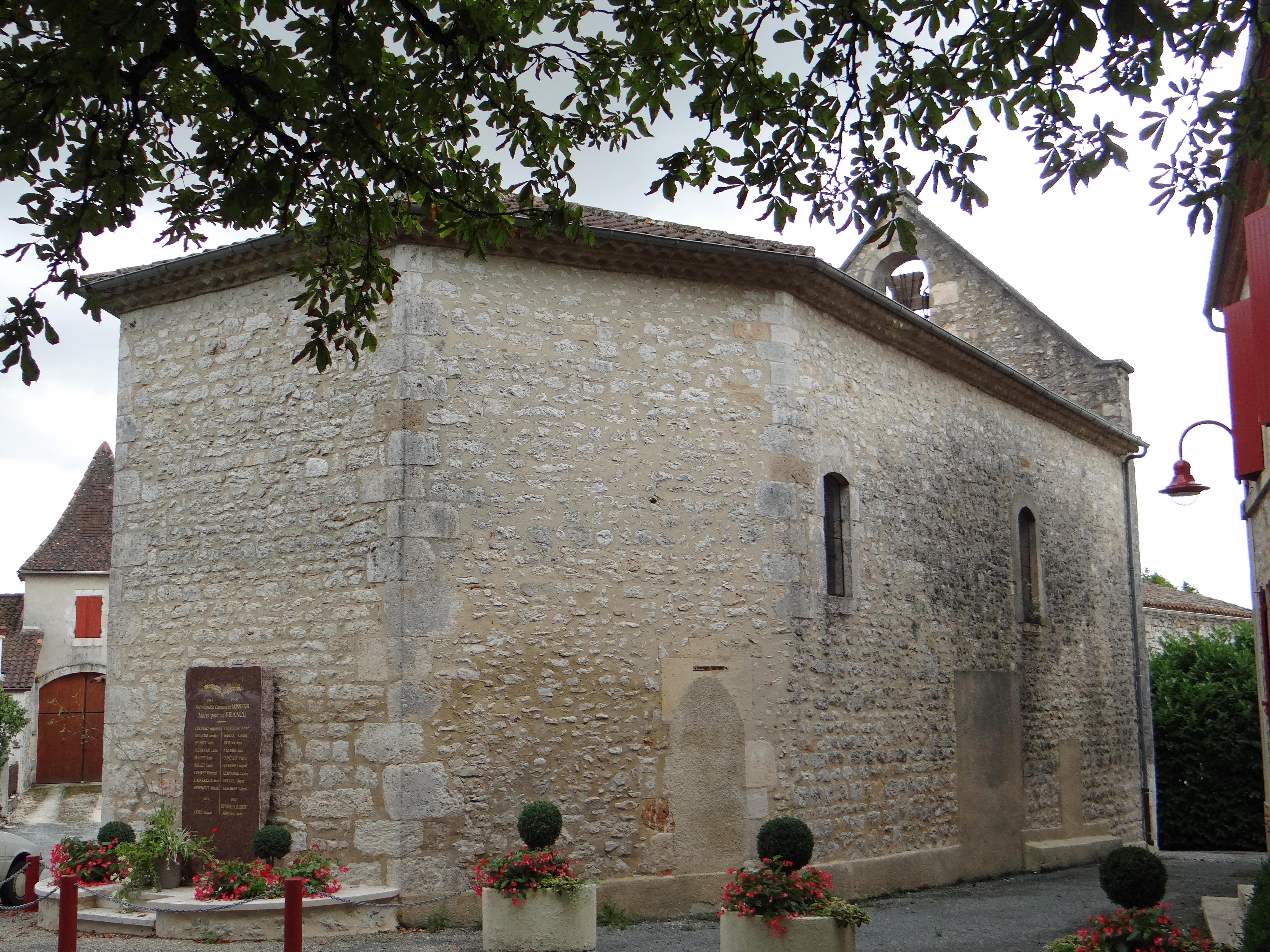 Monségur (Lot-et-Garonne) - Église Notre-Dame vue depuis le chevet